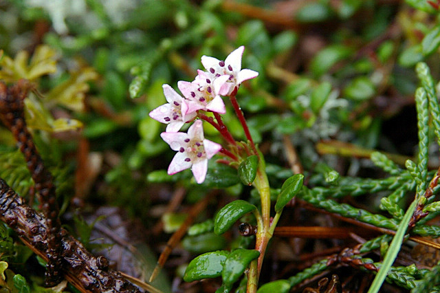 ミネズオウ （北海道羅臼岳） Loiseleuria procumbens (Mt. Rausu, Hokkaido, JAPAN)